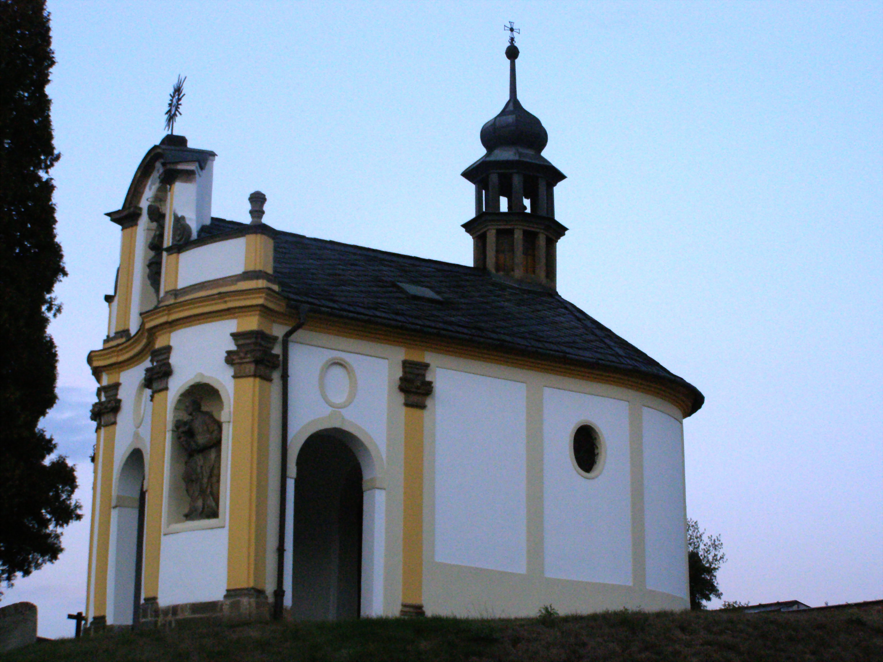 Kaple sv. Františka Xaverského v Kokorách.